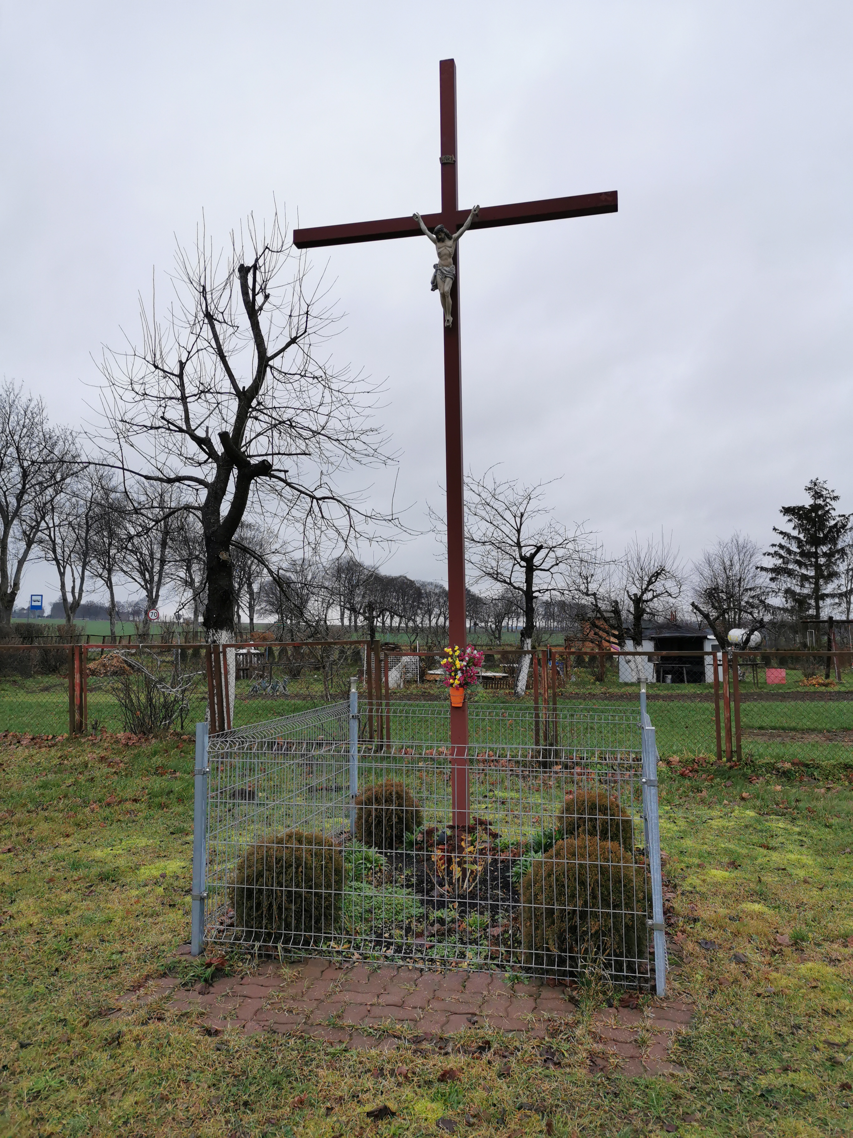 Przydrożny krzyż w Dobieszewku w gminie Dębnica Kaszubska